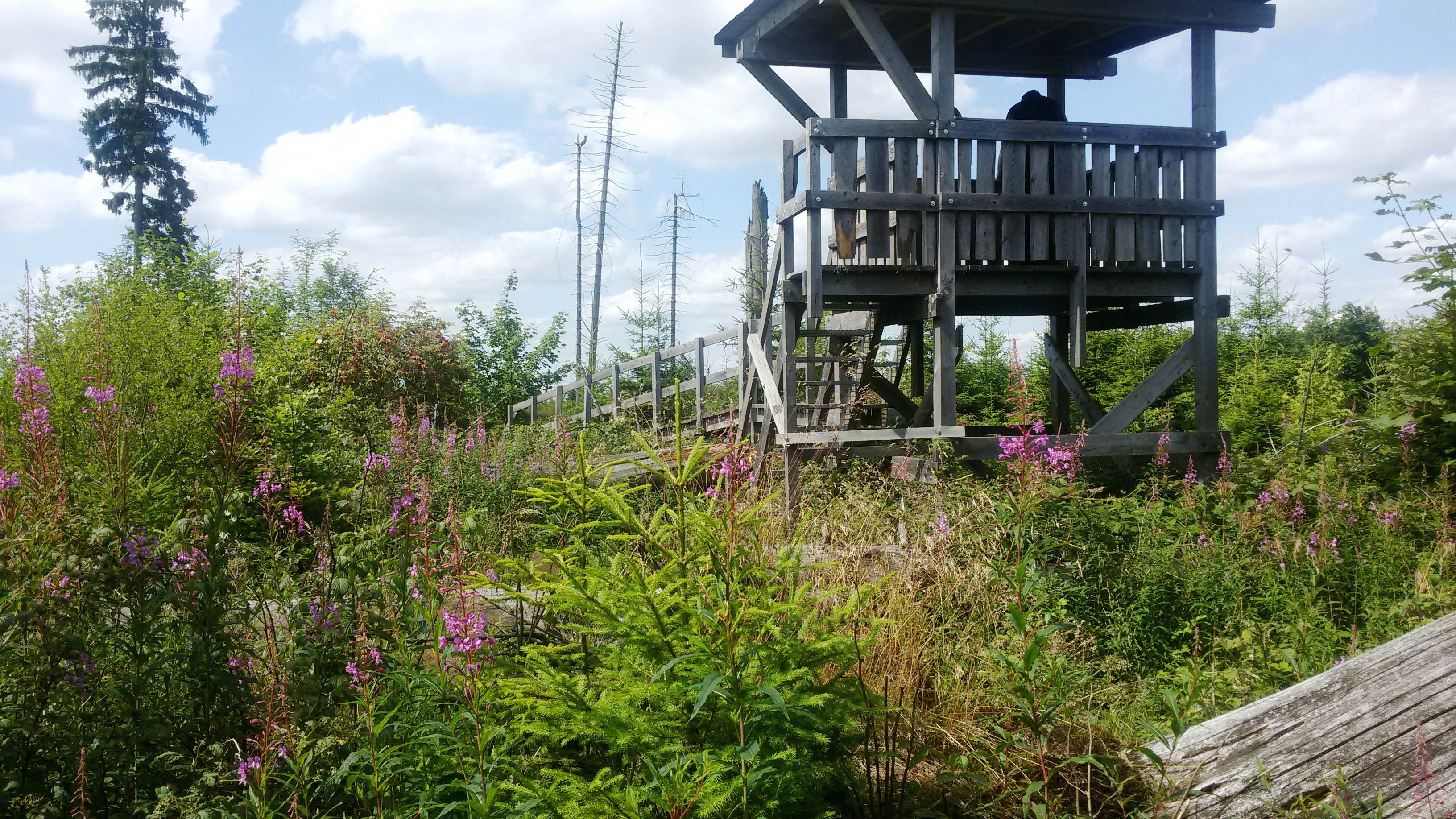 Vegetation 10 Jahre nach Kyrill (Juli 2017)